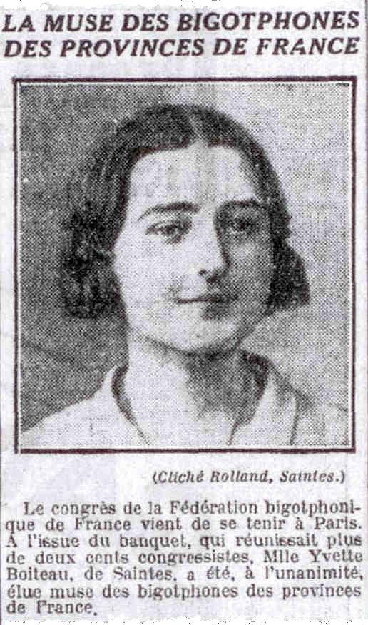 La Muse des Bigotphones des provinces de France